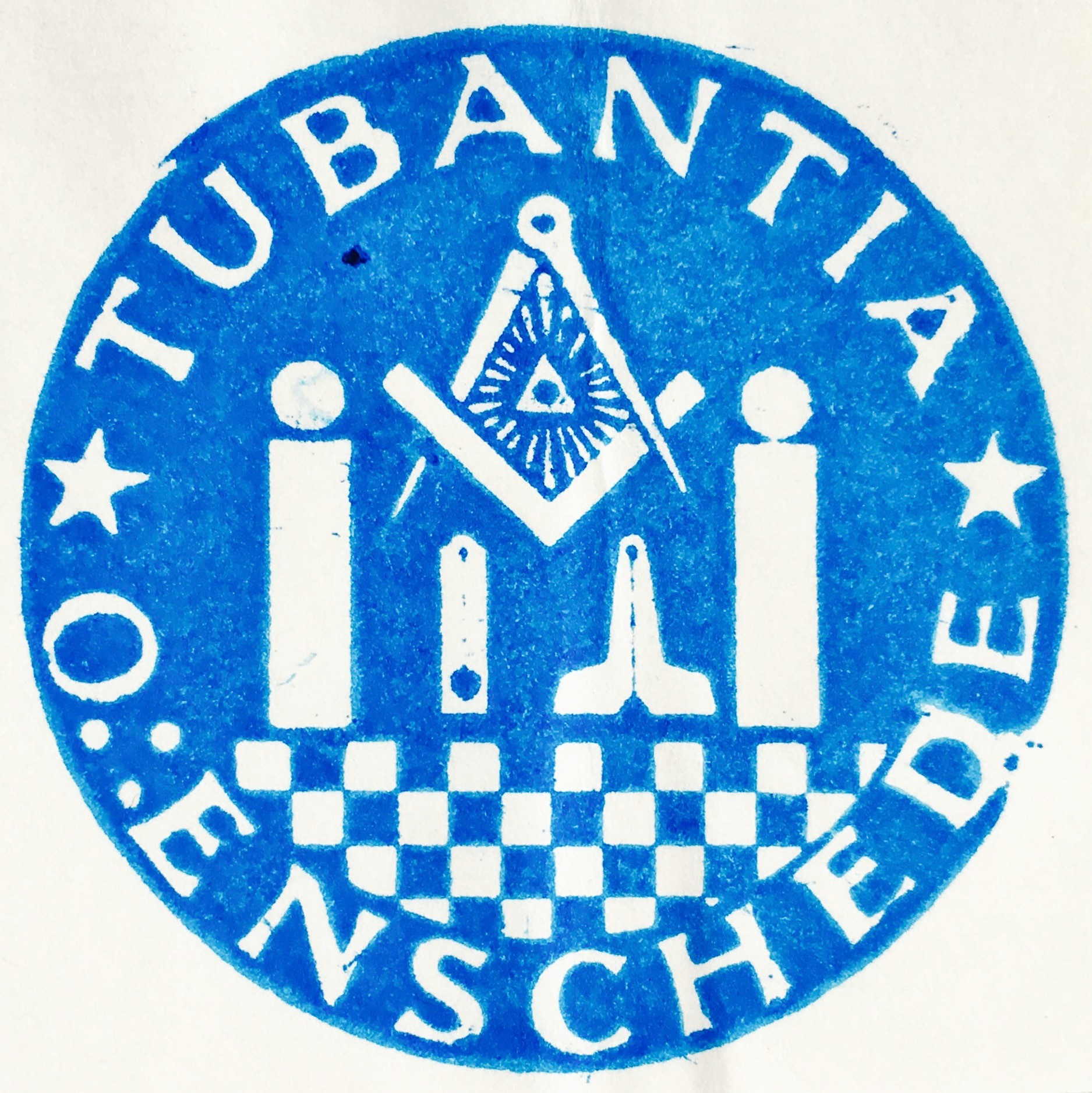 Zegel van een Nederlandse vrijmetselaarsloge